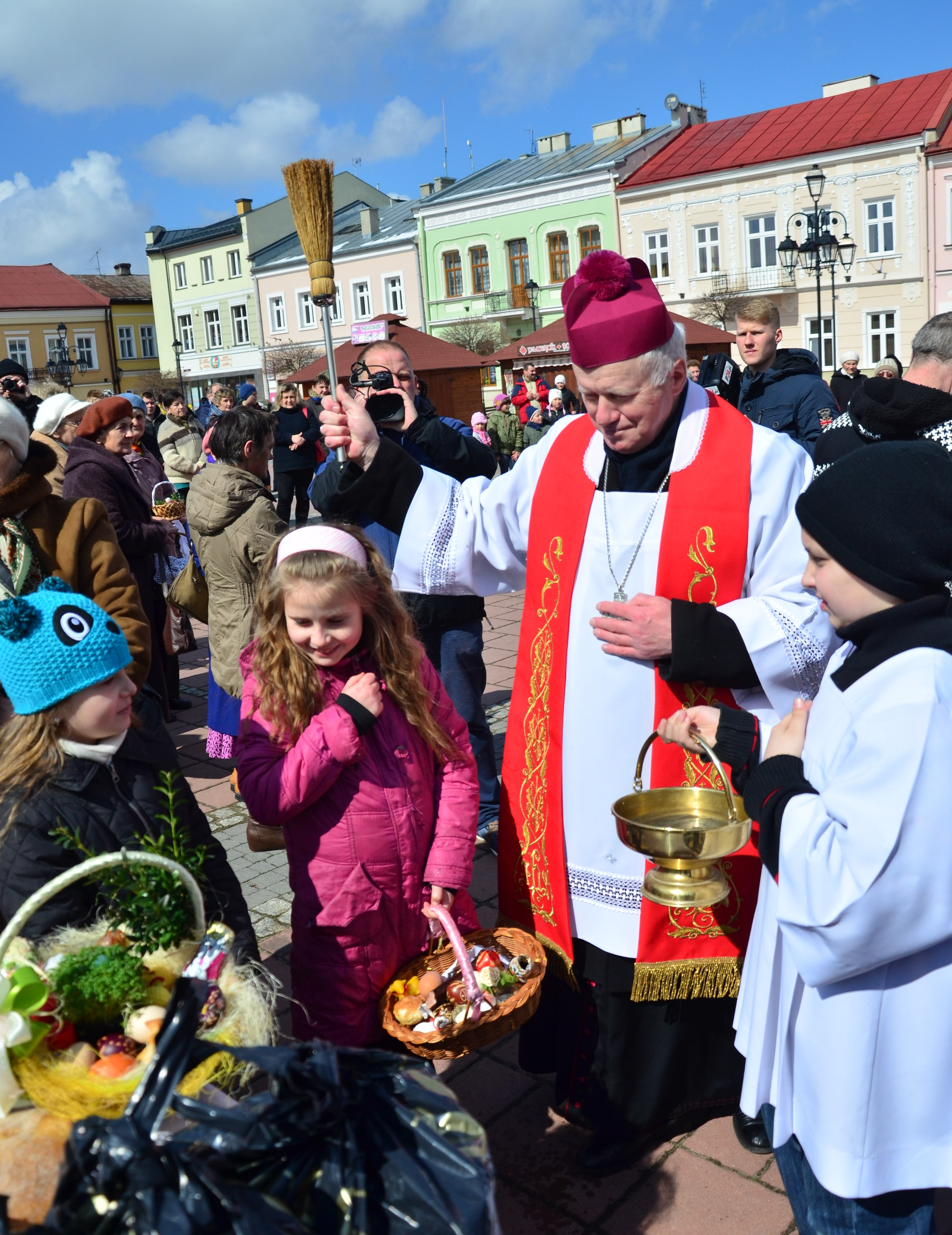 Osterspeisensegnung in Beskiden 2015